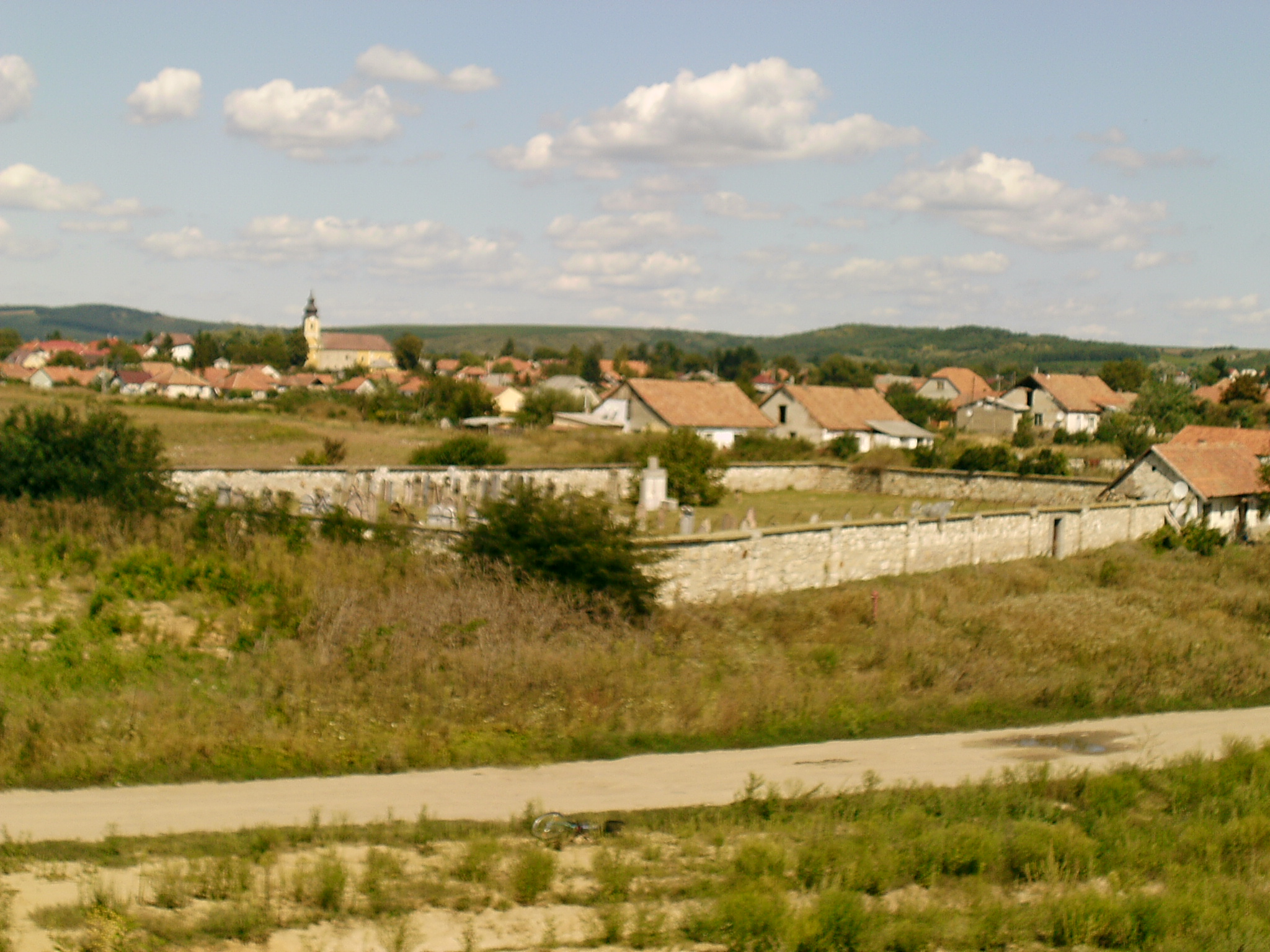 Zsidó temető, Verpelét